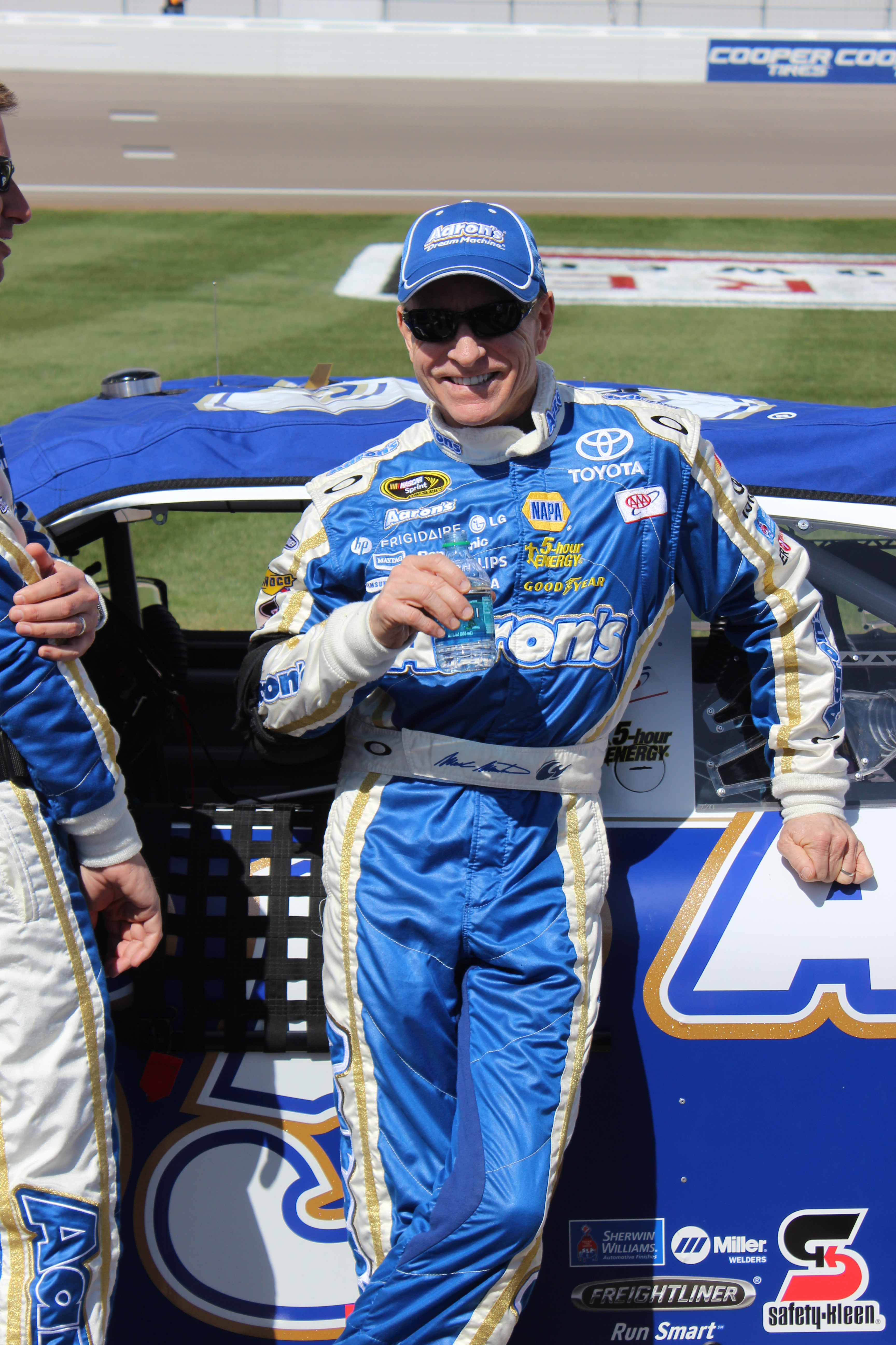 2012 Kobalt Tools 400 in Las Vegas